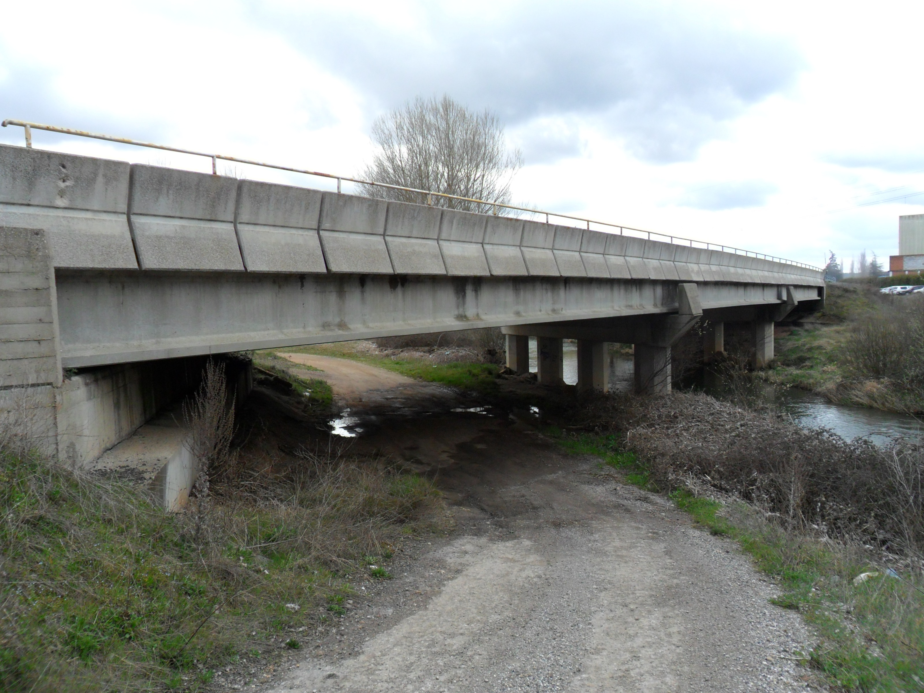 Puente Nuevo sobre el río Burejo.